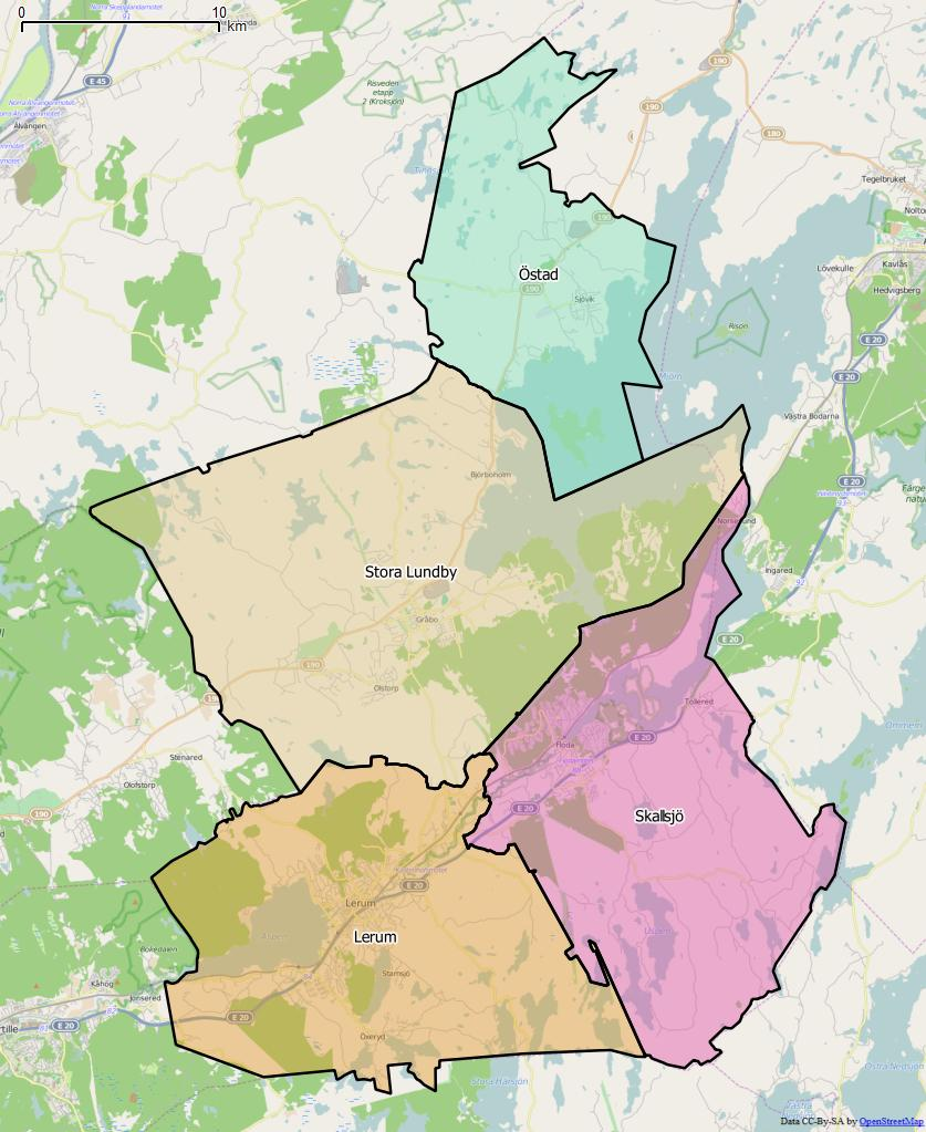 Distriktsindelningen i Lerums kommun World file: 55.96210766398691305 0 0 -55.96210766398691305 1347566.97013804246671498 7964757.279777891933918